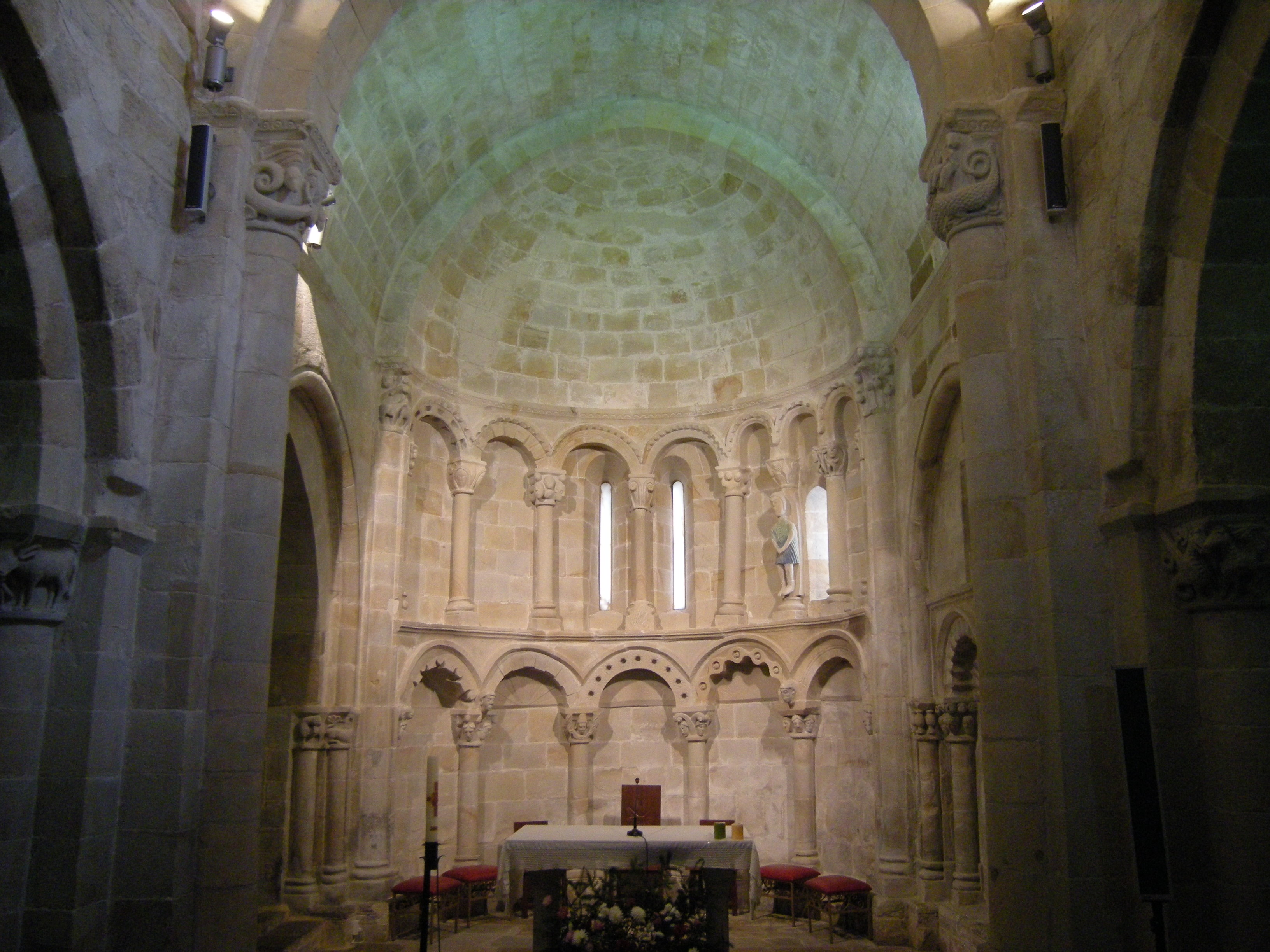 Interior del ábside de Santa María de Bareyo (Cantabria, España).